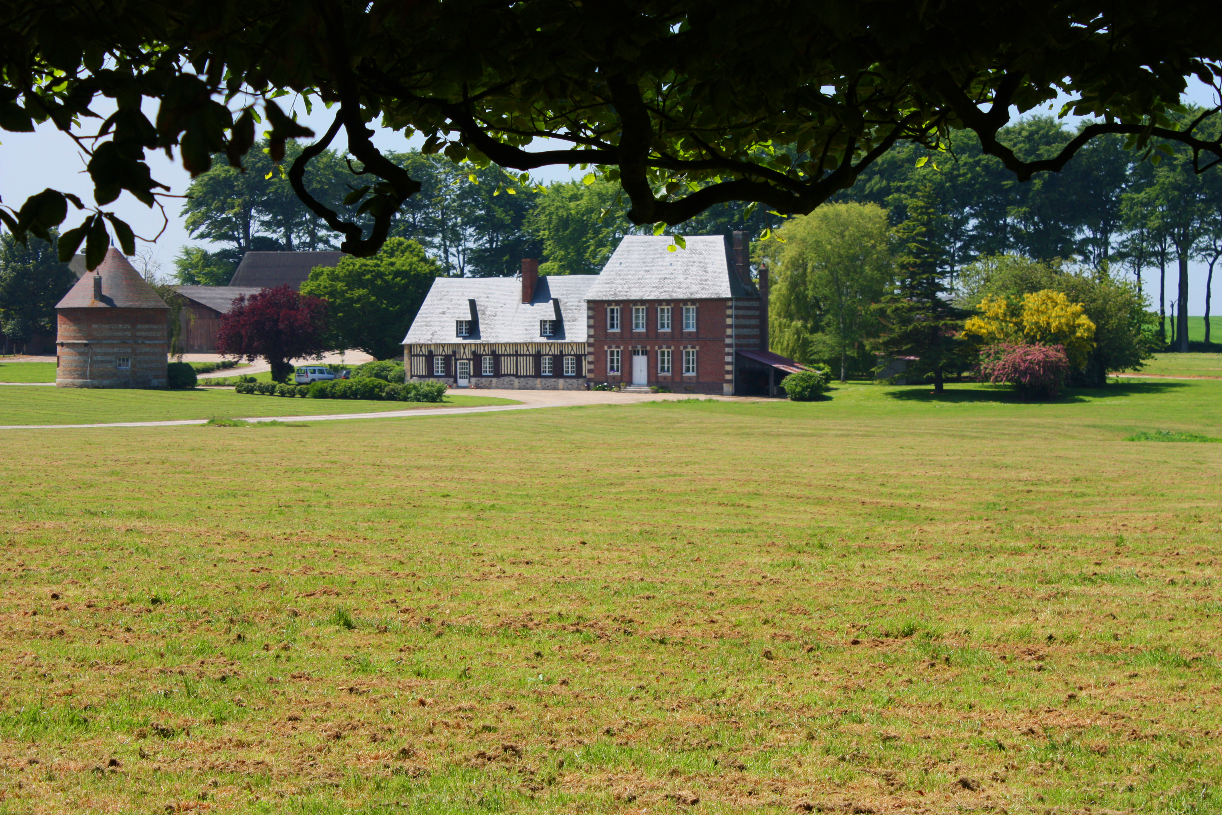 Maison cauchoise dans un clos masure près de Fécamp.